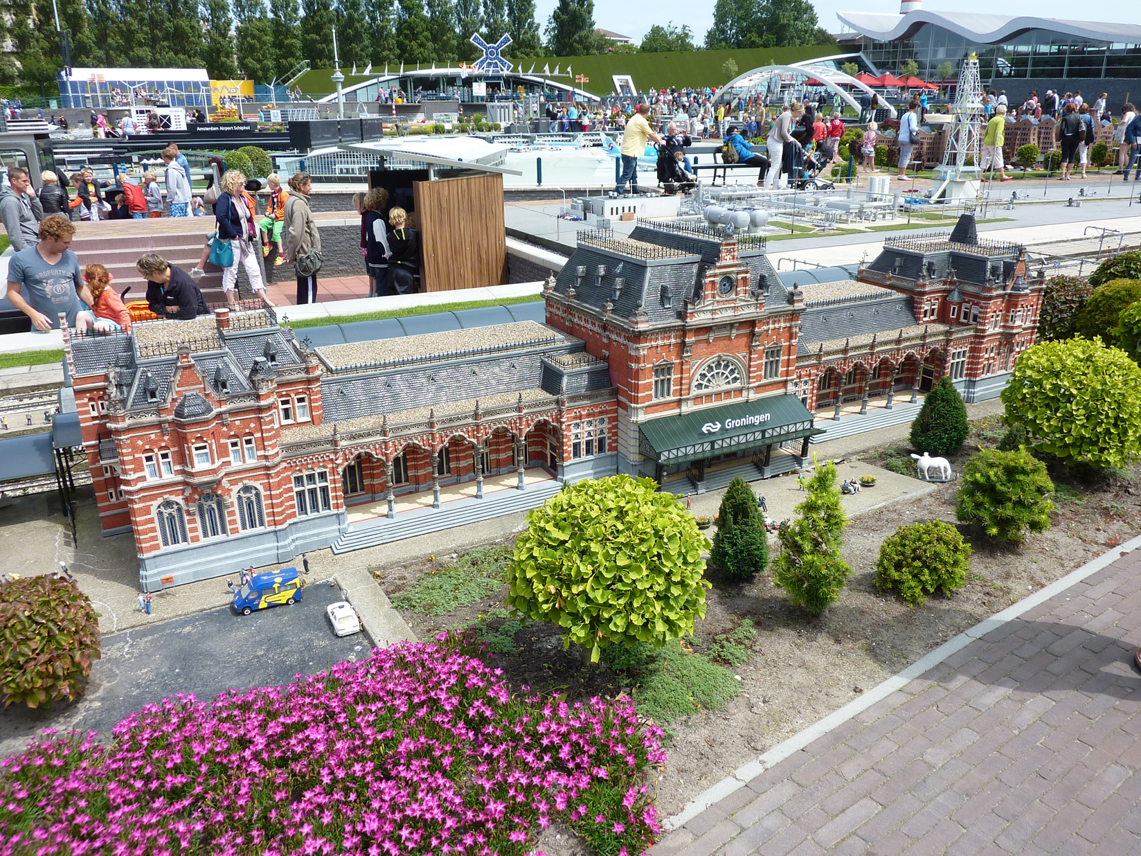 Der Bahnhof groningen als Miniatur in Madurodam